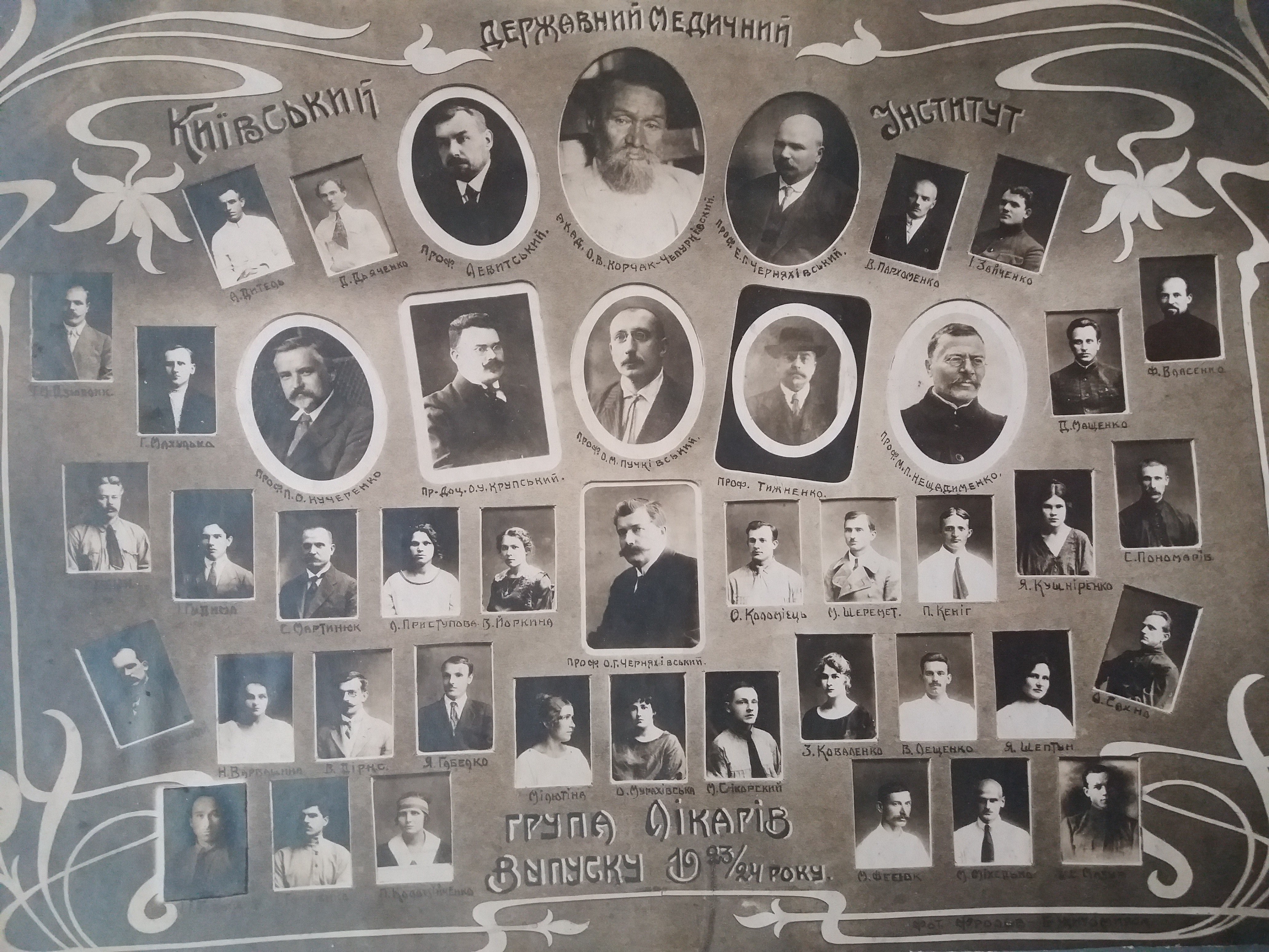 1923-1924г